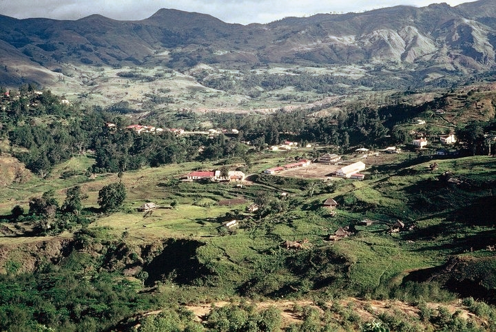 No topo da colina,a linda pousada; a meio, a rua central da vila com as suas lojas;na direita , o Centro de Saúde.Na actualidade está muito diferente.